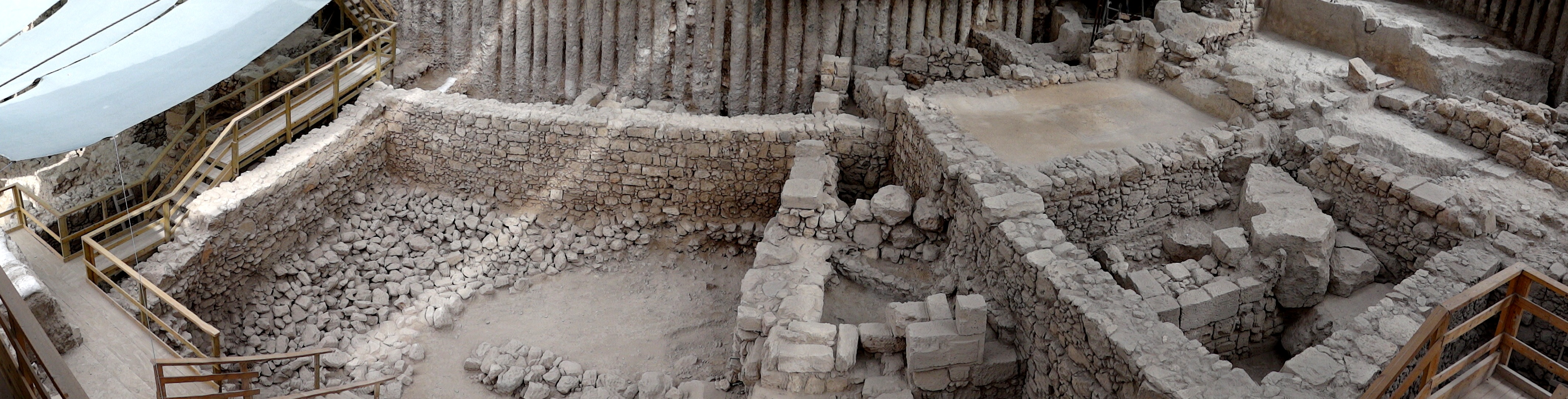 Excavation in City of David Givaty parking lot Jerusalem, Israe, status on October 12, 2011 חניון גבעתי בעיר דוד הינו חלק מהאתר הארכאולוגי עיר דוד. החפירות באתר זה החלו בחודש מרץ 2007. זו אחת מהחפירות הארכאולוגיות החשובות הנעשות בתחום עיר דוד שבשכונת סילואן בירושלים. הארכאולוגים האחראים הם דורון בן עמי ויאנה צ'חנוביץ תמונות שצולמו ב- 12 באוקטובר 2011 שטח M3 החלק הצפוני מזרחי של החניון. החצר - ומסביבה חדרים בחלק הצפון מזרחי של הוילה. בחדר מימין נחפרה הרצפה וניתן לראות קיר הלניסטי/חשמונאי ואת סלע האם